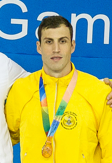 Bronze para Leonardo de Deus no nado borboleta costas em Gimcheon pelos 6º Jogos Mundiais Militares. Foto: Sgt Johnson Barros